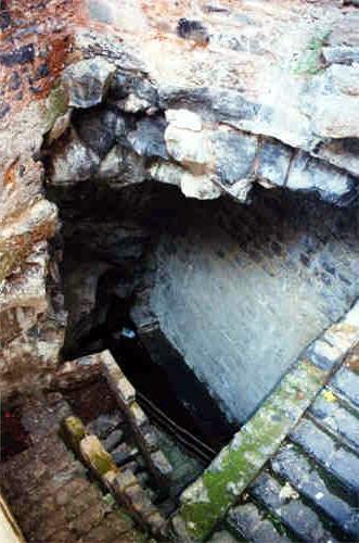 Catania. L'ex pozzo (ora prosciugato) di Gammazita. Gammazita è il nome di una giovane ragazza protagonista di una leggenda assai famosa nella città di Catania e che ha dato il nome ad una cavità nel centro storico della città siciliana, chiamata appunto "Pozzo di Gammazita".